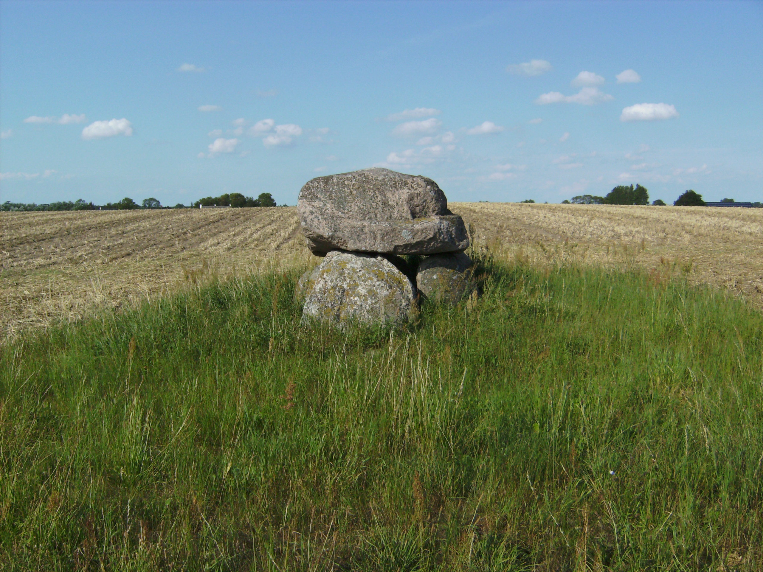 Oldtidsgrave ved Grønnegade nord for Nysted Dolmens north of Nysted, Denmark